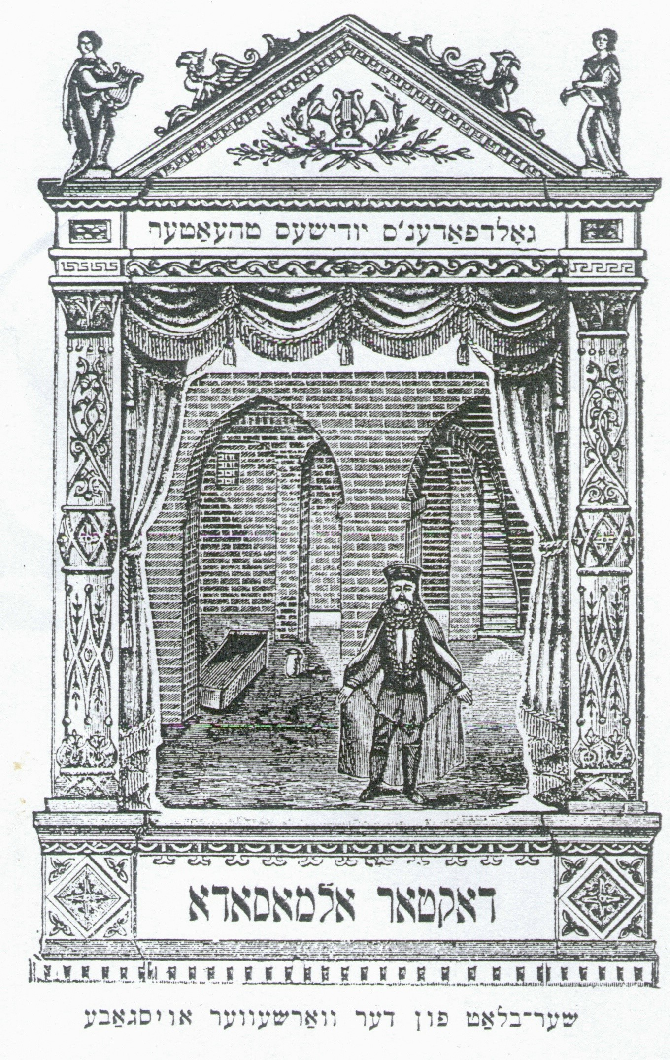 ייִדיש: תמונת שער של המחזה דוקטור אלמסדו